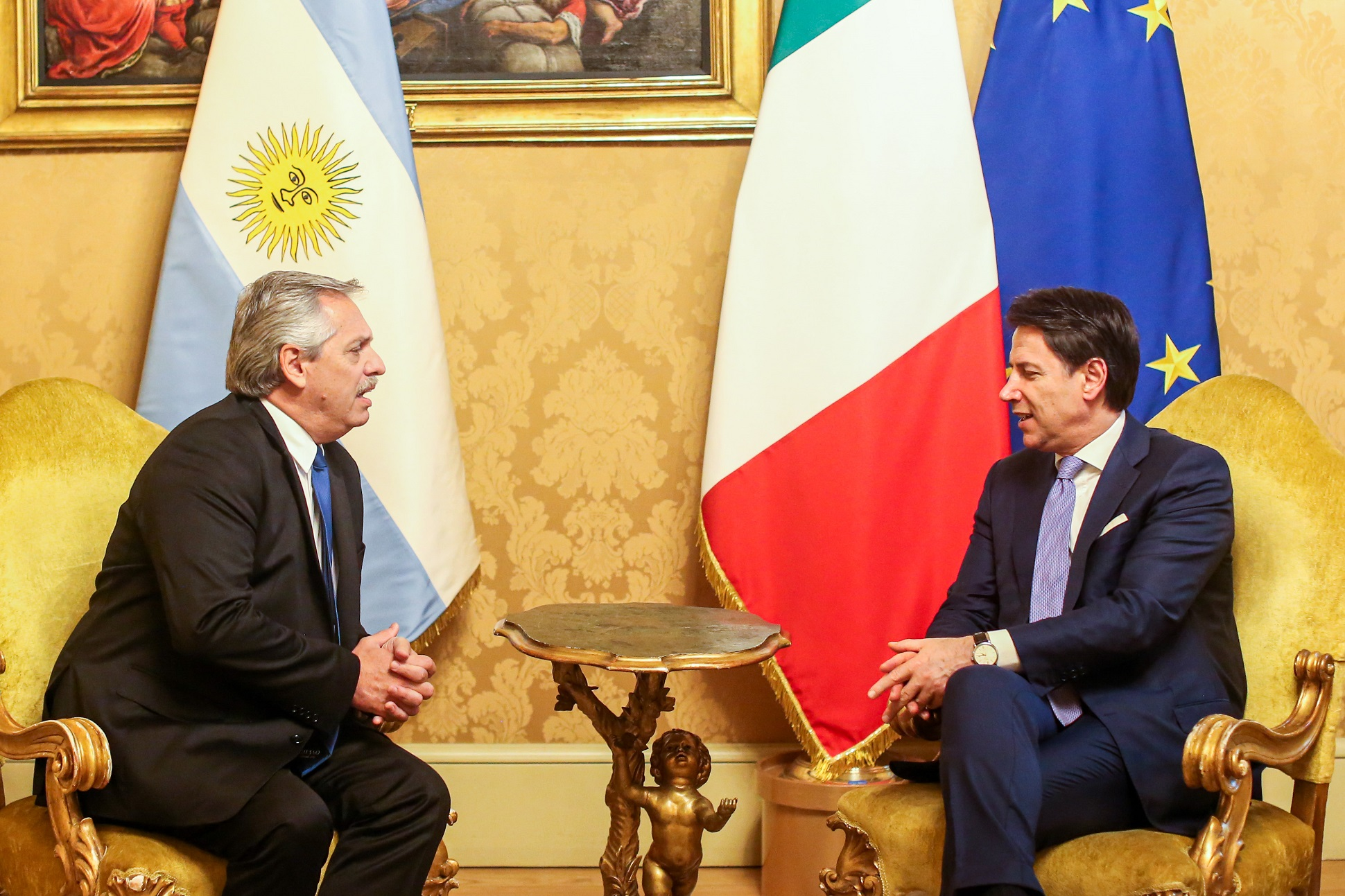 El presidente Alberto Fernández se reunió con el presidente del Consejo de Ministros de Italia, Giuseppe Conte, en el Palacio Chigi de Roma.